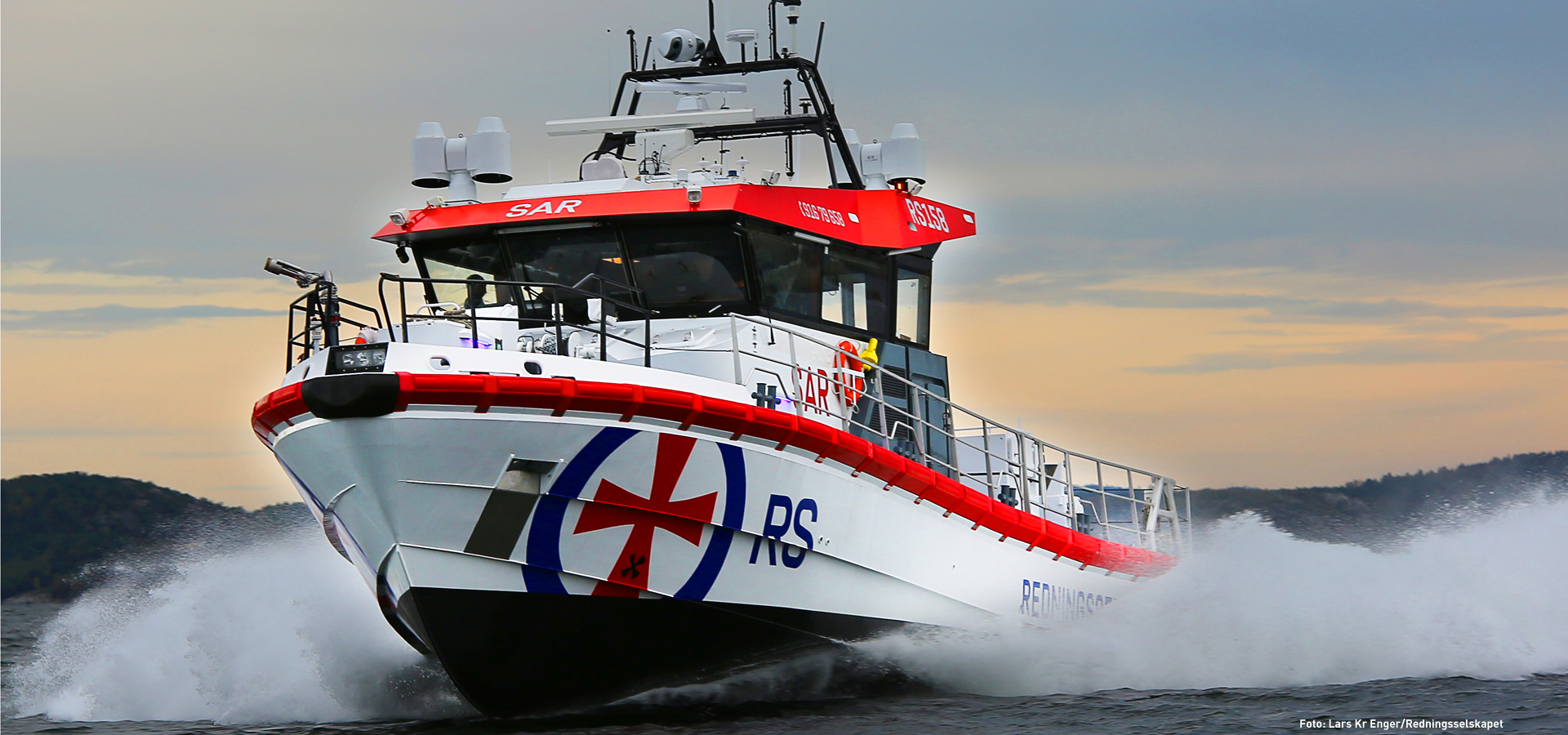 RS 158 «Idar Ulstein» er per 1. januar 2017 Redningsselskapets flaggskip med det siste innen utstyr for søk og redning. Skøyta kombinerer stor slepekraft med toppfart på nesten 40 knop. Foto: Redningsselskapet/ Lars. Kr. Enger